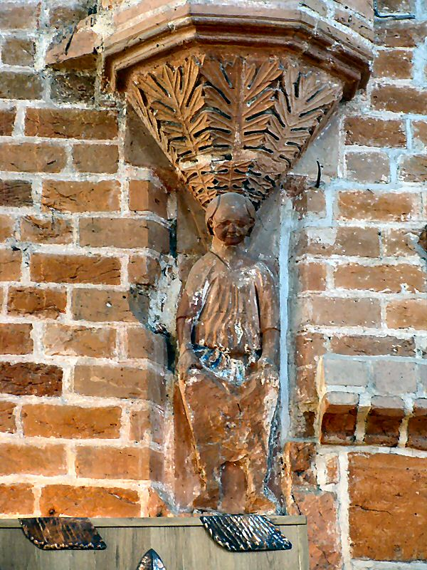 Kościół św. Jana Ewangelisty w Szczecinie - wspornik figuralny (służka)